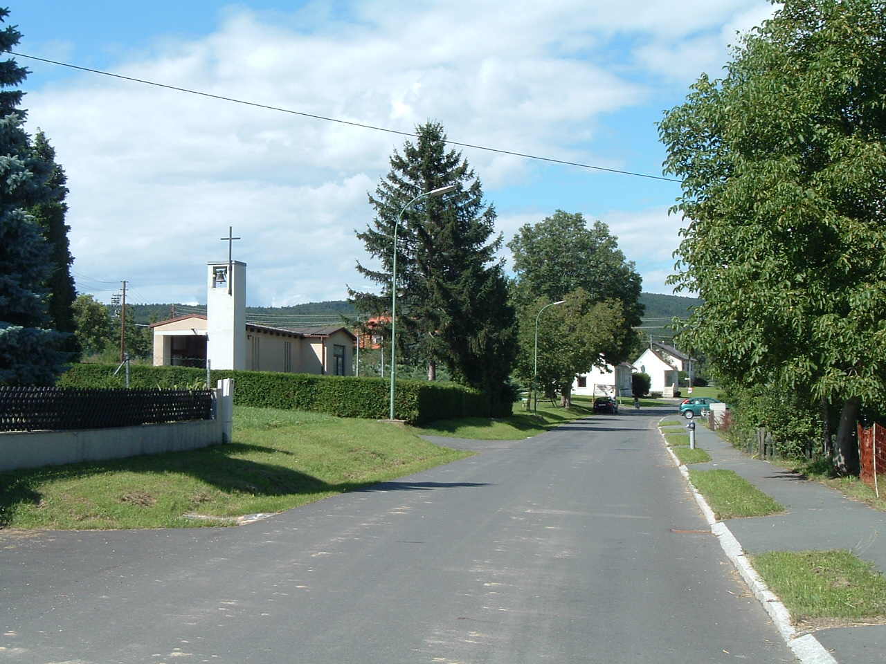 Allersgraben, Burgenland, Austria